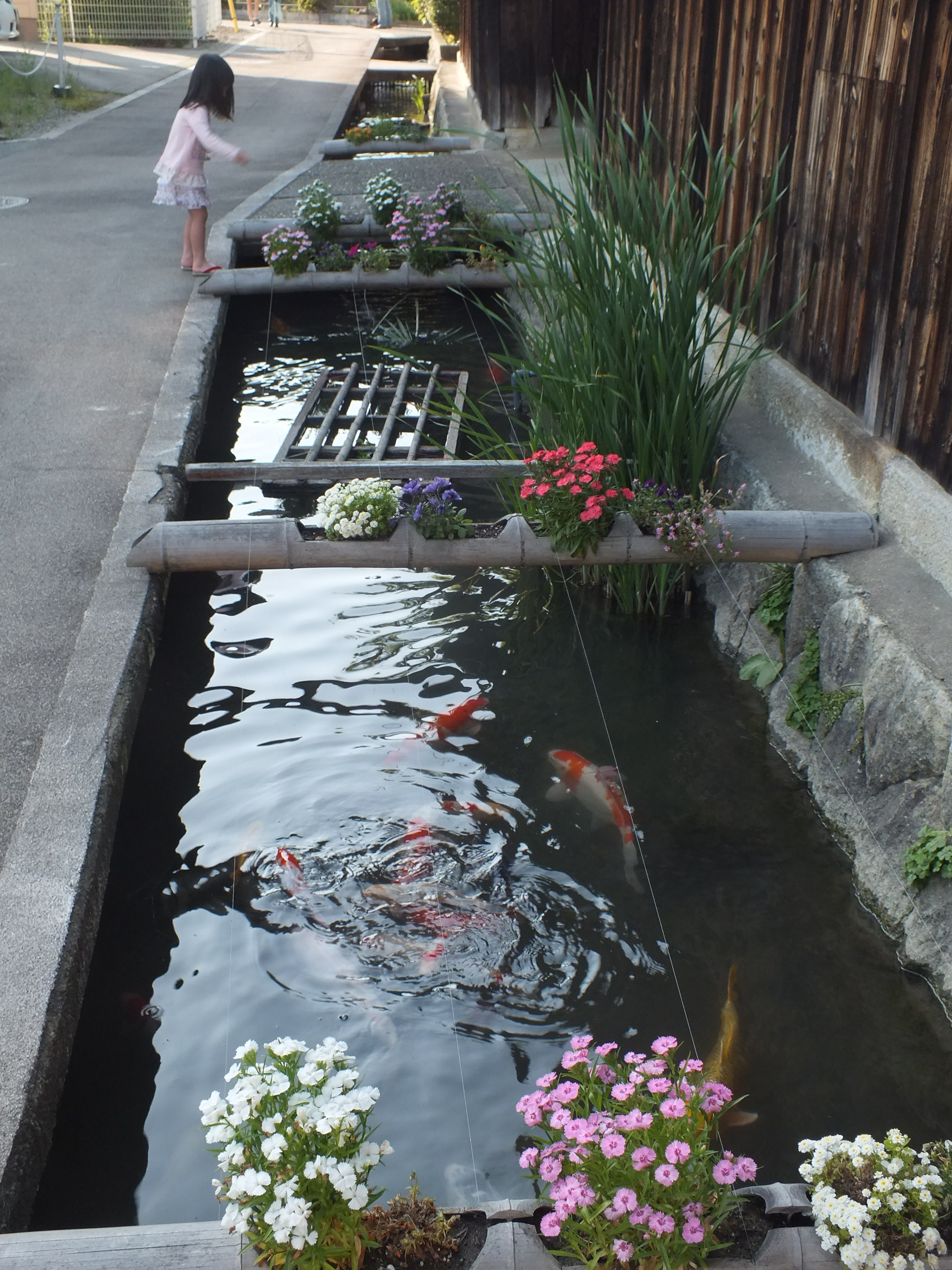 Old Kishi-House Nishiwaki,Hyogo,Japan 旧来住家住宅（来住梅吉旧邸）